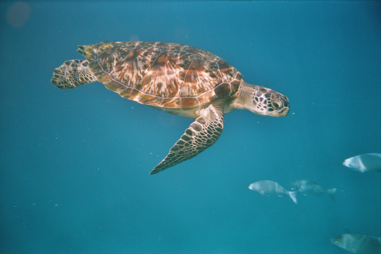 Eine Suppenschildkröte, Andamanen See, Similan Inseln, Thailand